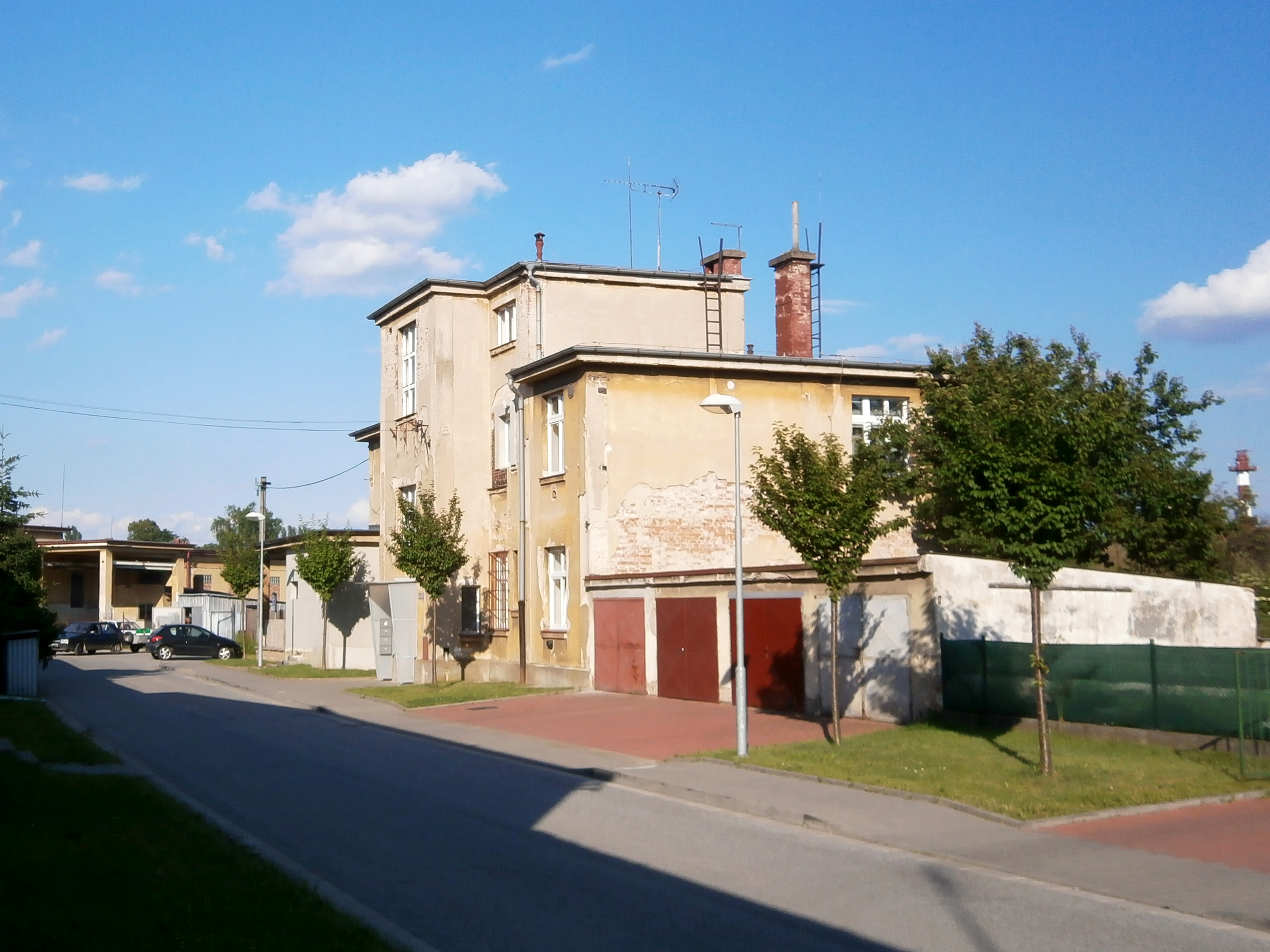 Kydlinovská 816/87, Hradec Králové-Pražské Předměstí. Budova, kde bývaly laboratoře bývalých ústředních jatek v Hradci Králové